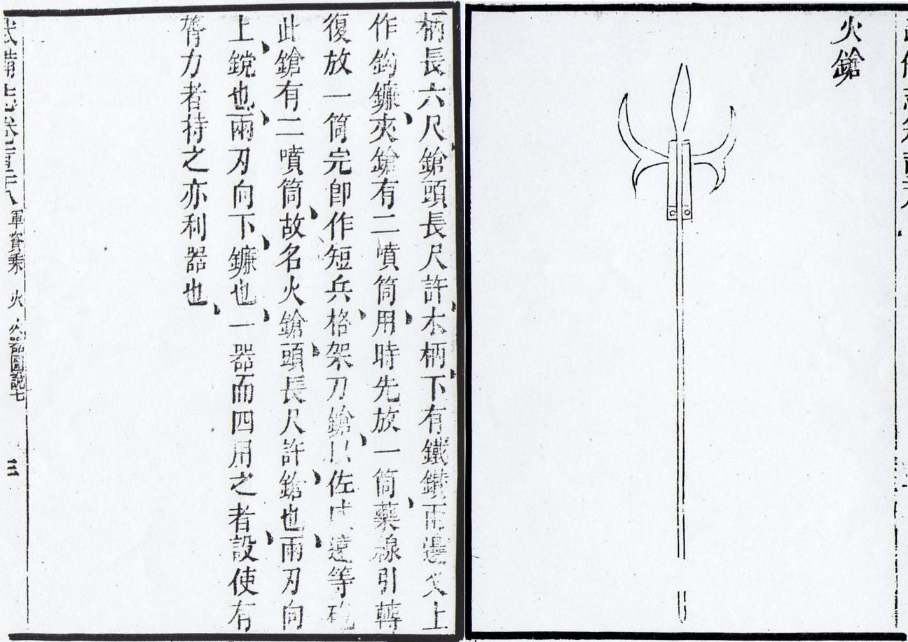 《武備誌》書中記載的火槍。